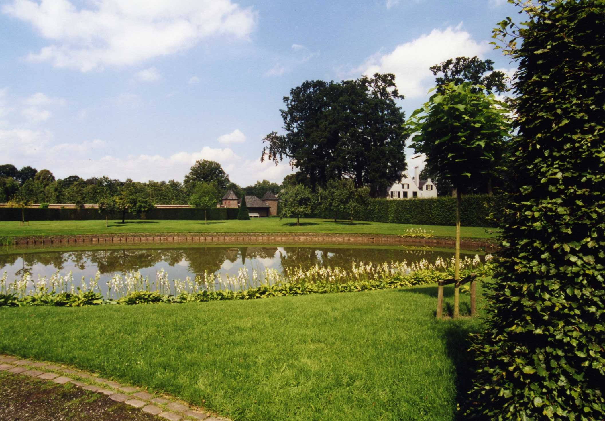 De tuin van 't Huis te Baest te Oostelbeers.